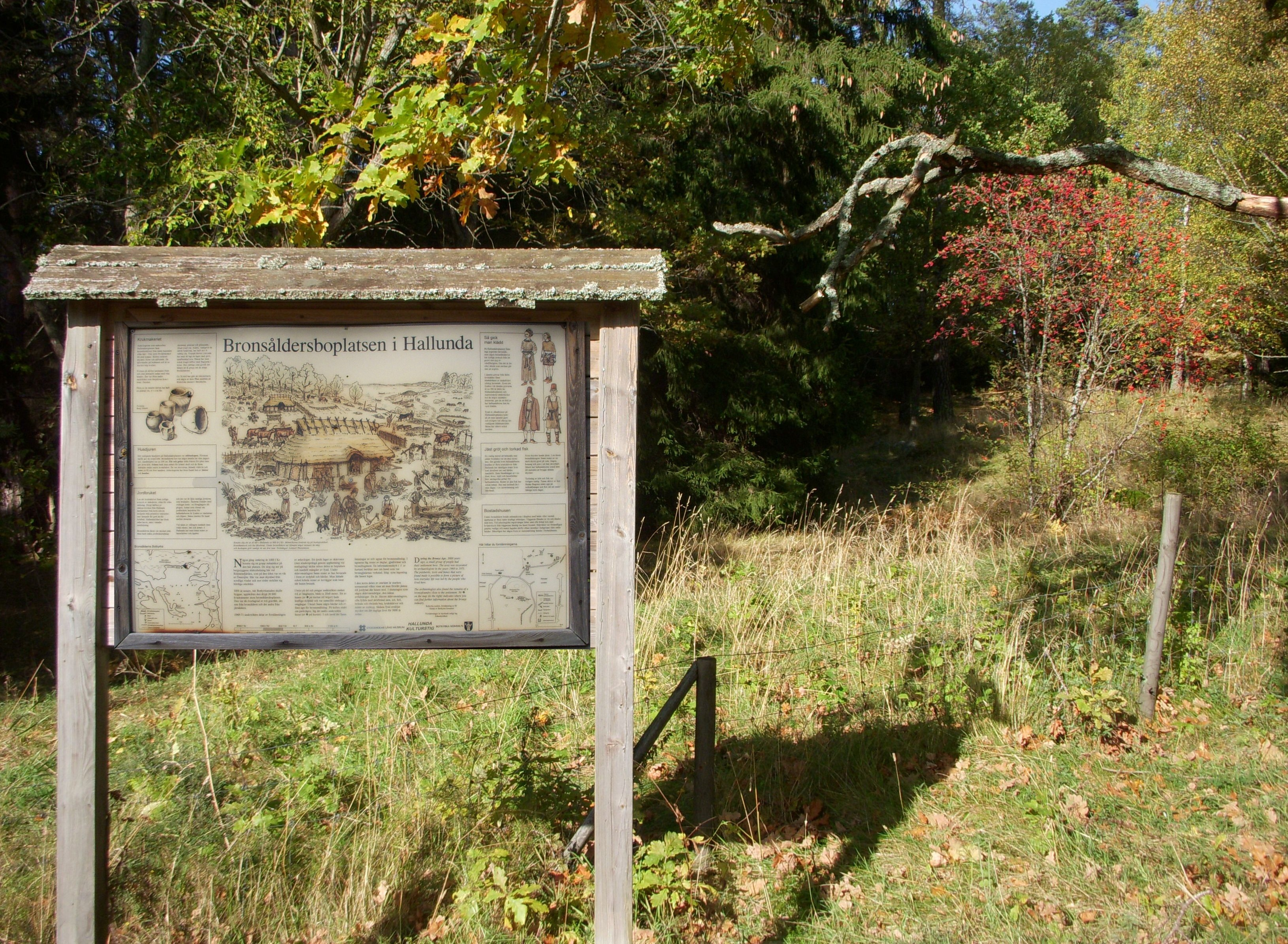 Hallunda kulturstig i Botkyrka, bronsåldersboplatsen